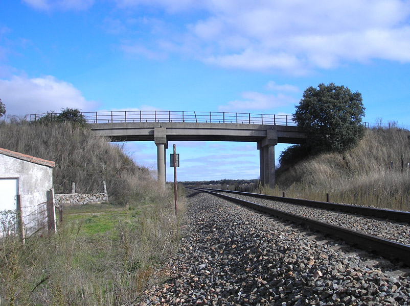 Paso elevado del p. k. 52,950 del ferrocarril Salamanca - Fuentes de Oñoro.